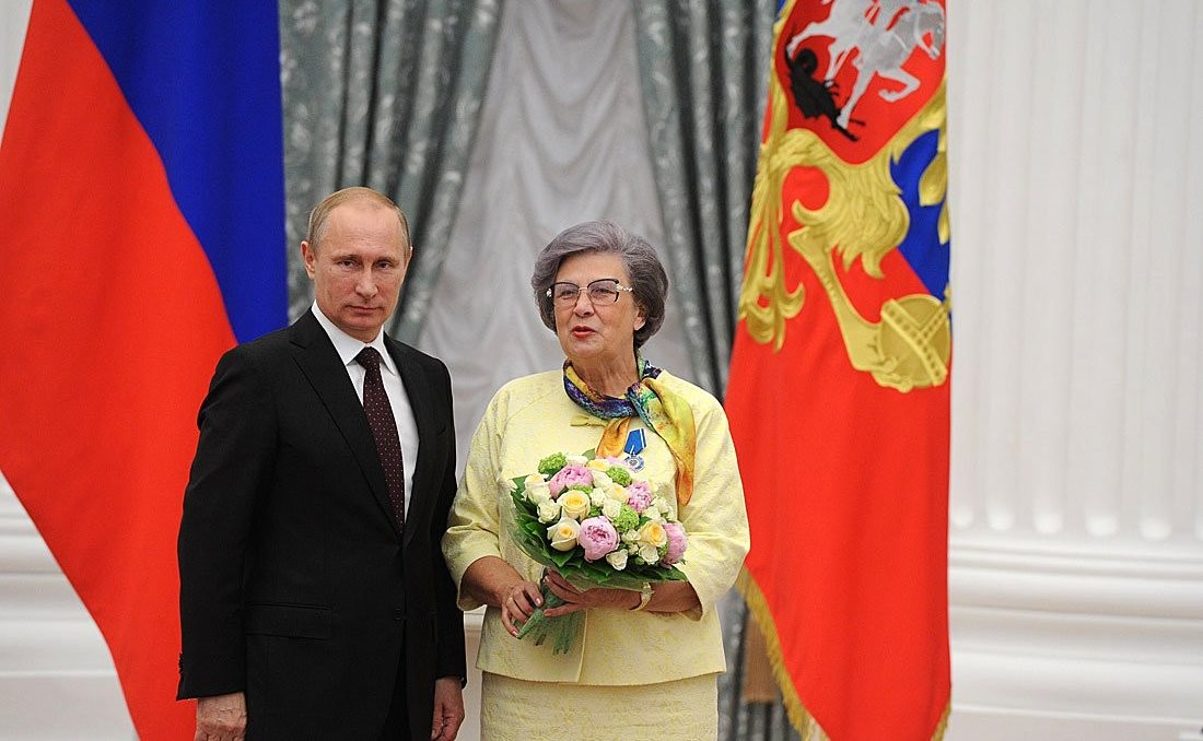 Орденом Почёта награждена Светлана Горячева